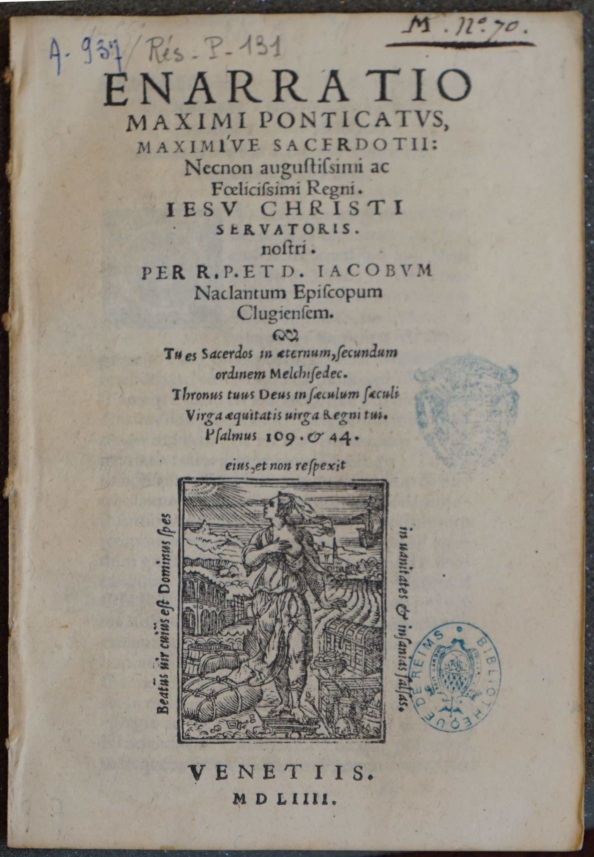 extrait du lvire.